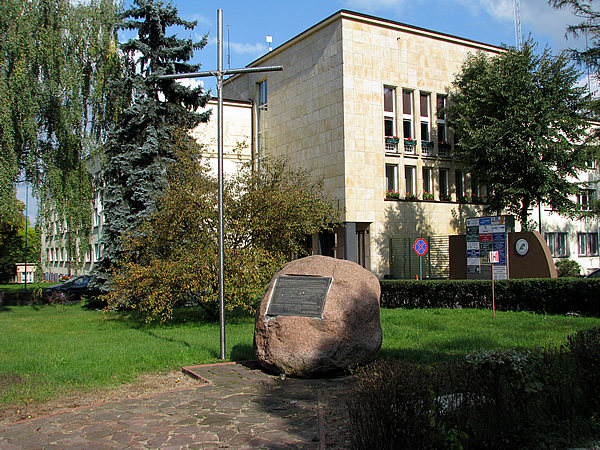 Radom, ul. 25 Czerwca 68 - siedziba Regionalnej Dyrekcji Lasów Państwowych